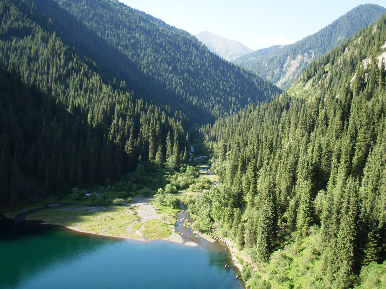 Lk Kolsoy 1